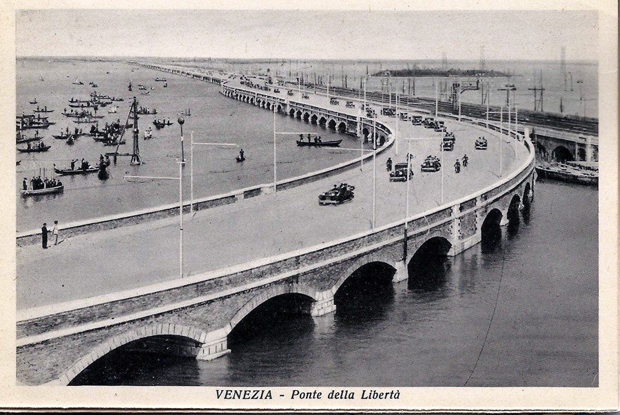 Carte postale des années 1930. Inauguration du pont du Licteur, rebaptisé de la Liberté à Venise.